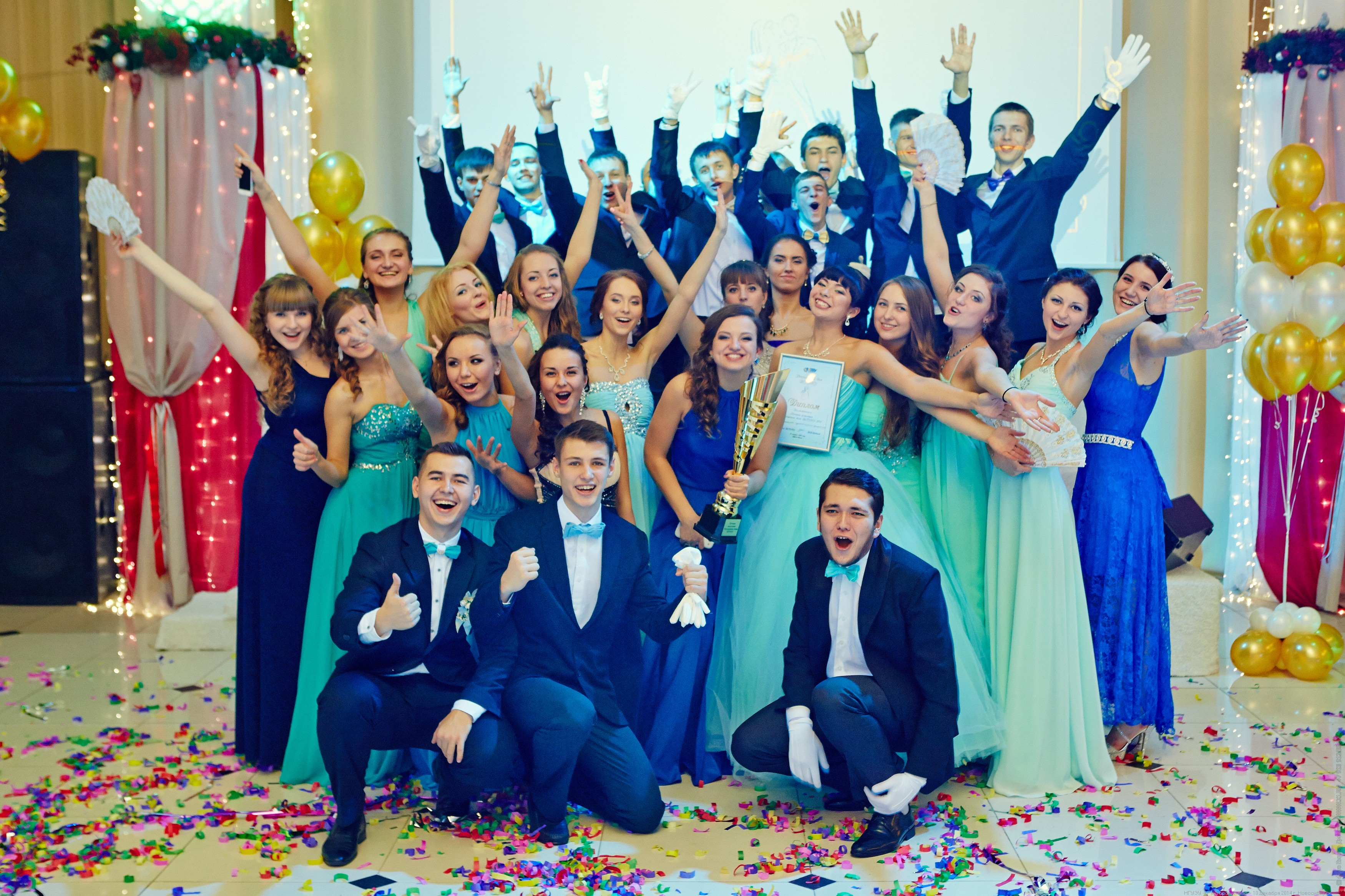 Студенты социально-гуманитарного факультета на Ректорском балу